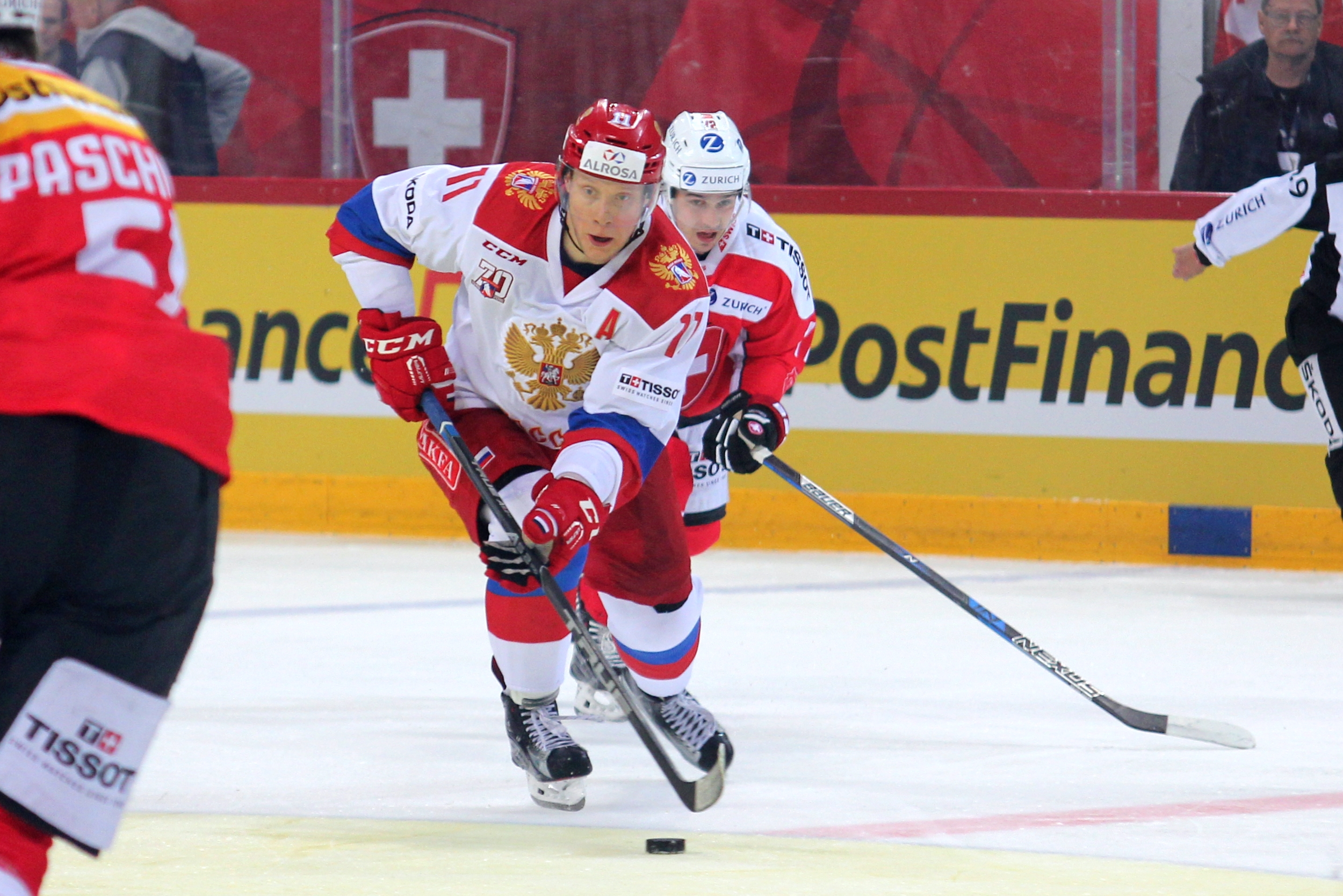 Sergey Andronov (R 11), Denis Malgin (S 72).